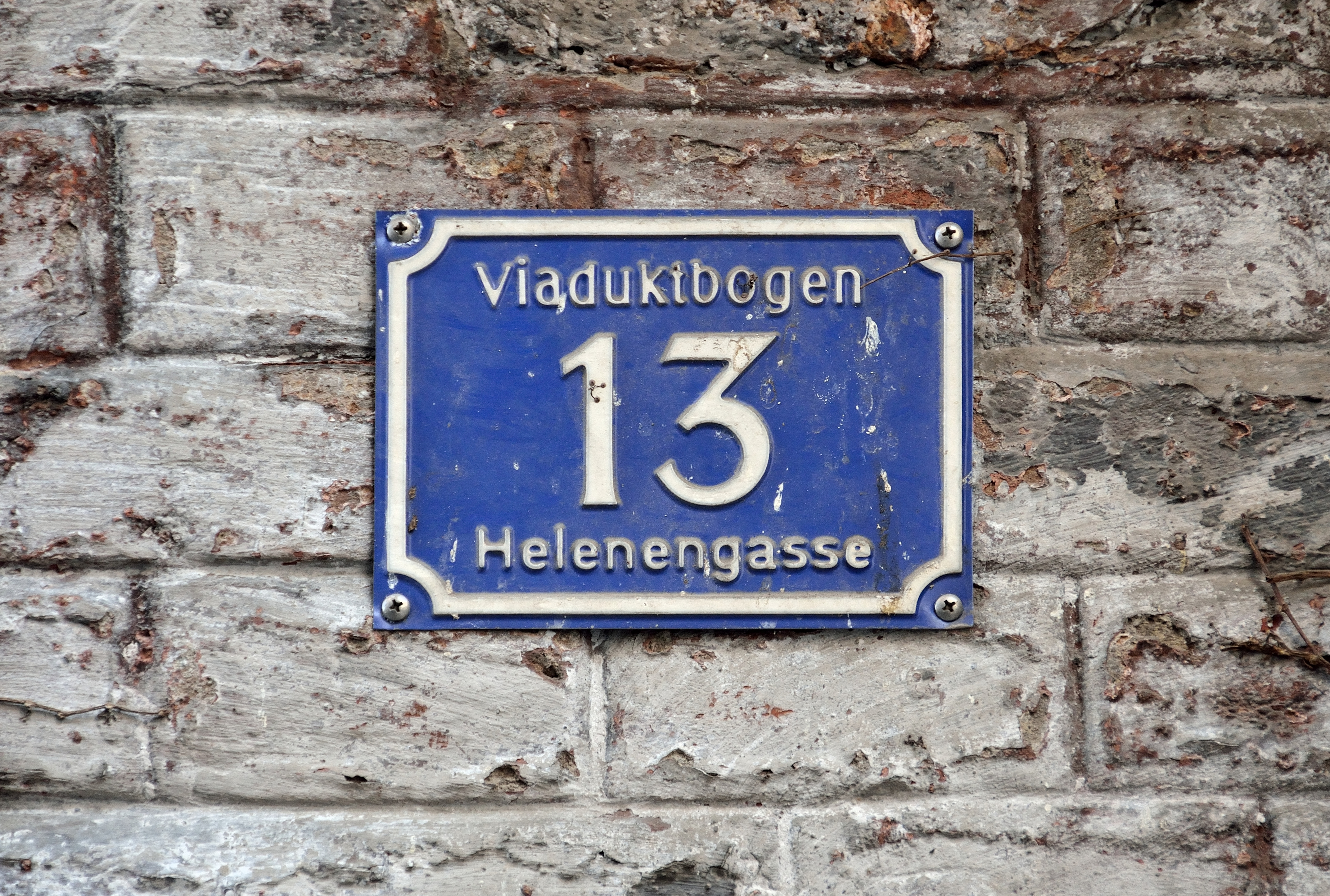 Bögen unter der Verbindungsbahn zwischen der Helenengasse und der Stoffellagasse in Wien-Leopoldstadt.